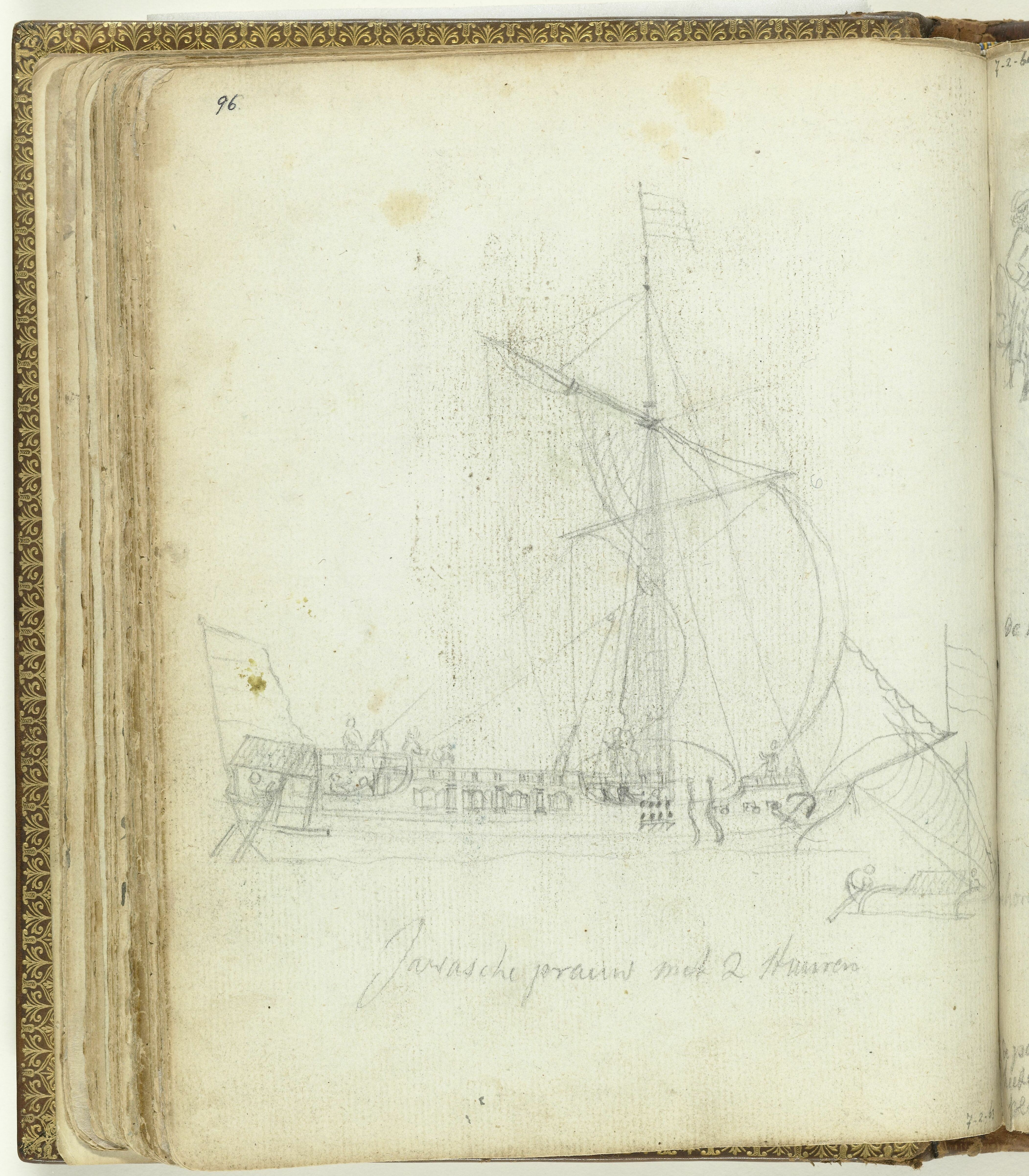 IdentificatieTitel(s): Javaanse prauw met twee stuurriemenObjecttype: tekening Objectnummer: NG-1985-7-2-63Opschriften / Merken: opschrift, onder: ‘Javasche prauw met 2 stuuren’Omschrijving: Potloodschets van een zeilend Javaans schip en kleine prauw. Met opschrift. Onderdeel uit het schetsboek van Jan Brandes, dl. 2 (1808), p. 96.VervaardigingVervaardiger: tekenaar: Jan BrandesPlaats vervaardiging: JavaDatering: 23-jan-1779 - 26-aug-1785Fysieke kenmerken: schets in potloodMateriaal: papier potlood Afmetingen: h 195 mm × b 155 mmOnderwerpWaar: JavaWie: Verenigde Oostindische CompagnieVerwerving en rechtenVerwerving: aankoop 2-mei-1985Copyright: Publiek domein